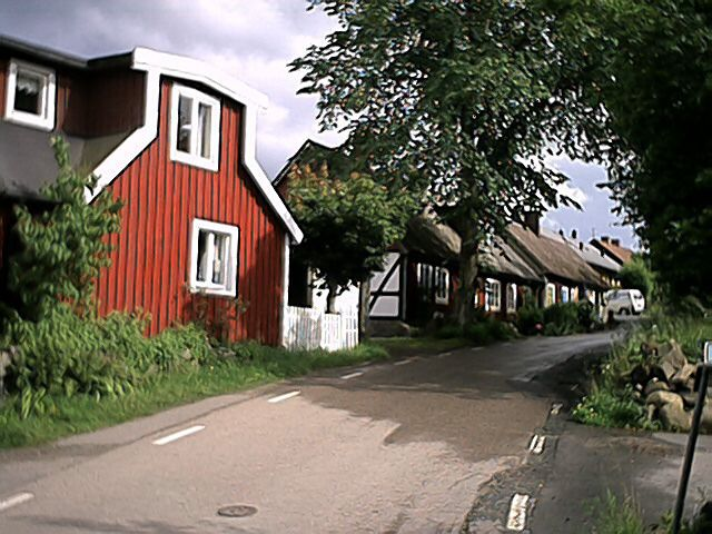 Gata i Södra Mellby. Fotograf: Väsk.